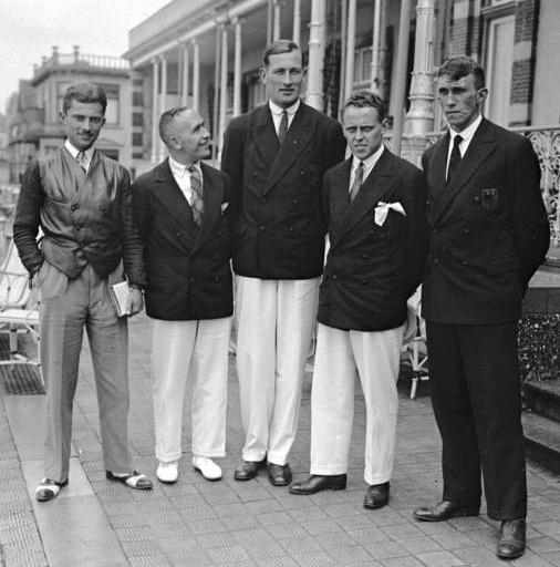 Bei den deutschen Olympia-Teilnehmern in Zandvoort / Holland! Die deutschen Olympia-Vertreter vor ihrem Hotel in Zandvoort v.re.n.li.: Körnig, Houben, Hofmeister, Corts und Dr. Wichmann .